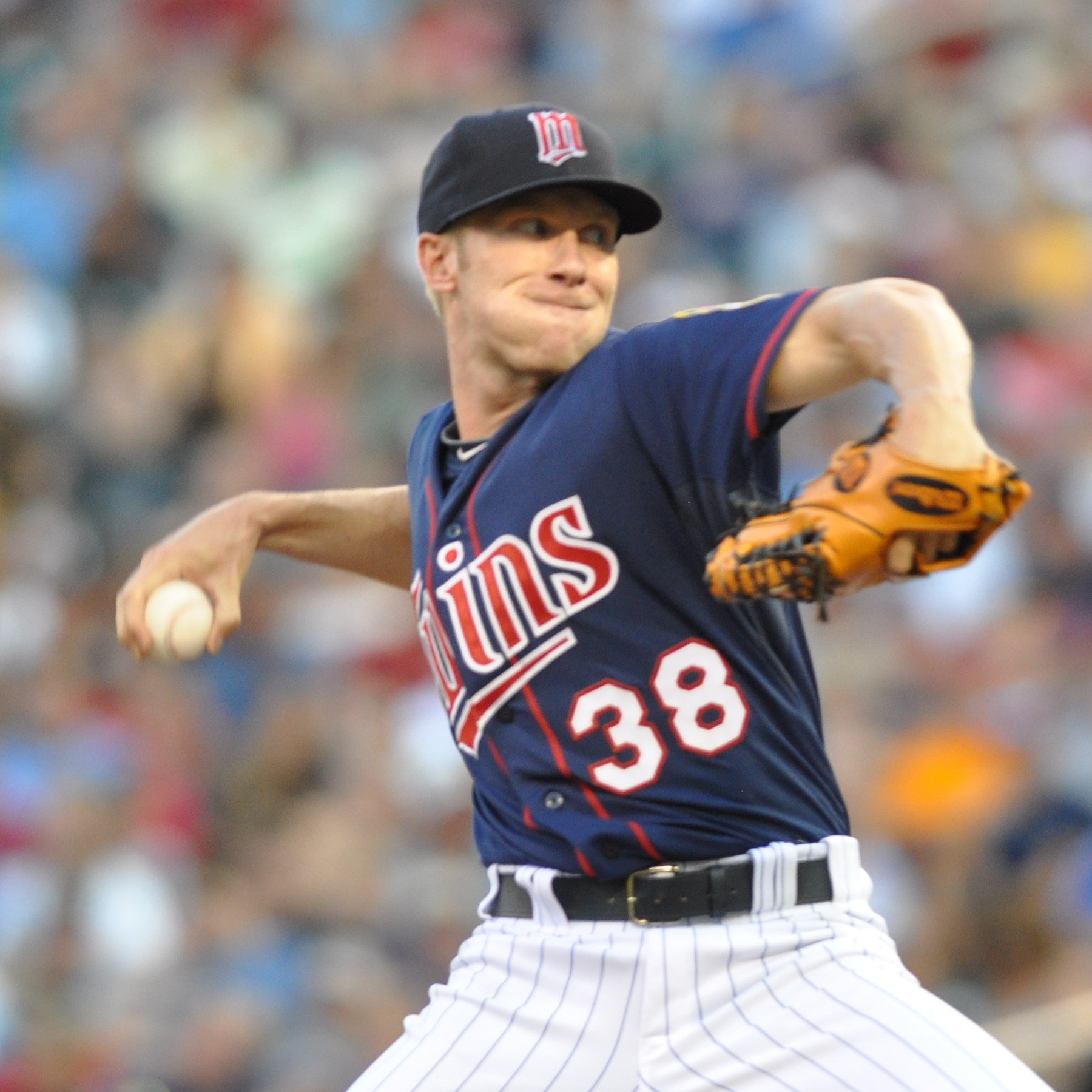 Cole De Vries